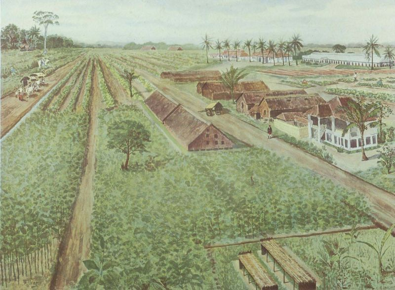 Schoolplaat. Kleurenlitho naar een aquarel van W.C. Bleckmann. Deze schoolplaat is n.r. 9 van de serie Zondervan.. Een tabaksplantage in Deli, Sumatra